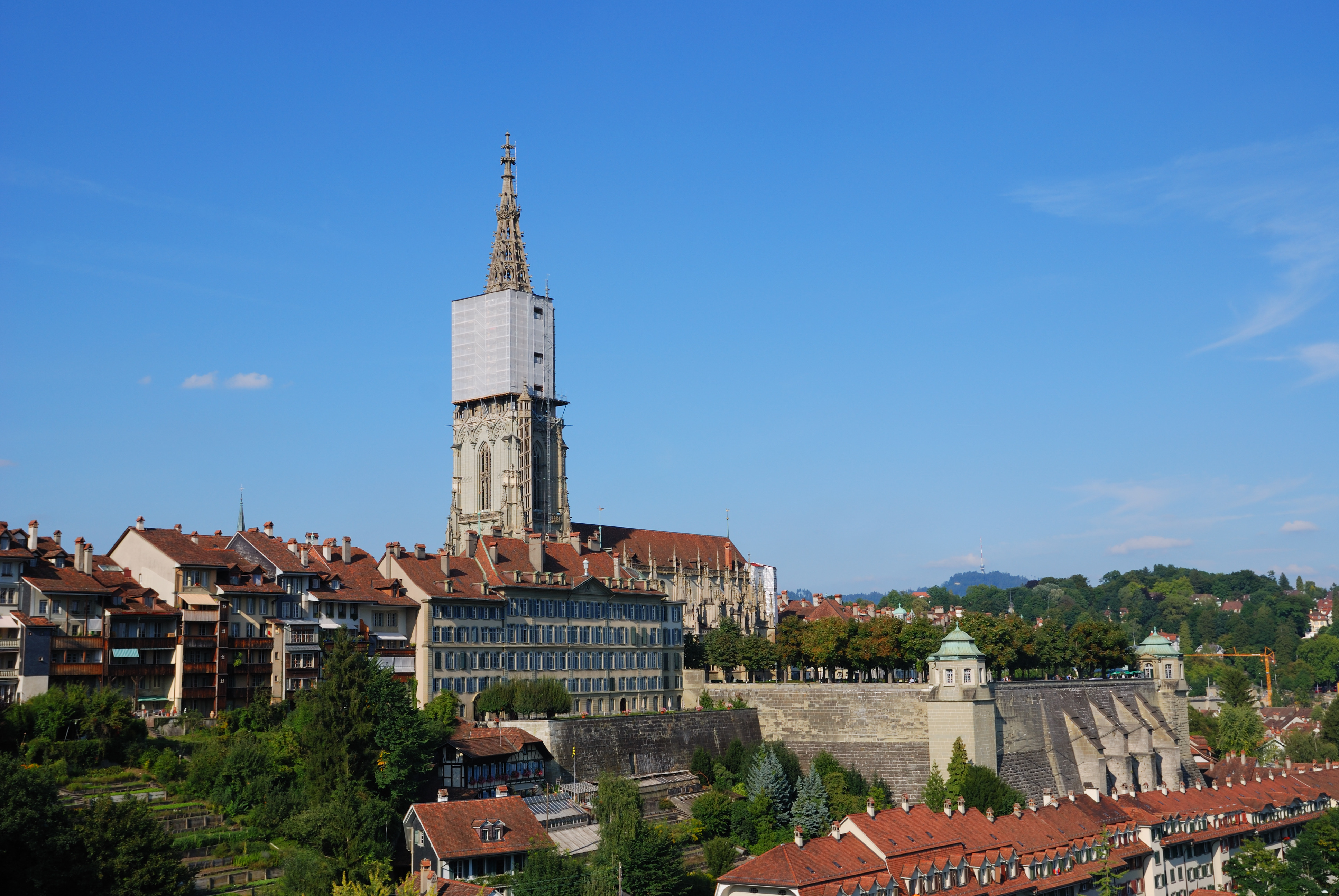 Münster und Münsterplattform in Bern von der Kirchenfeldbrücke aus